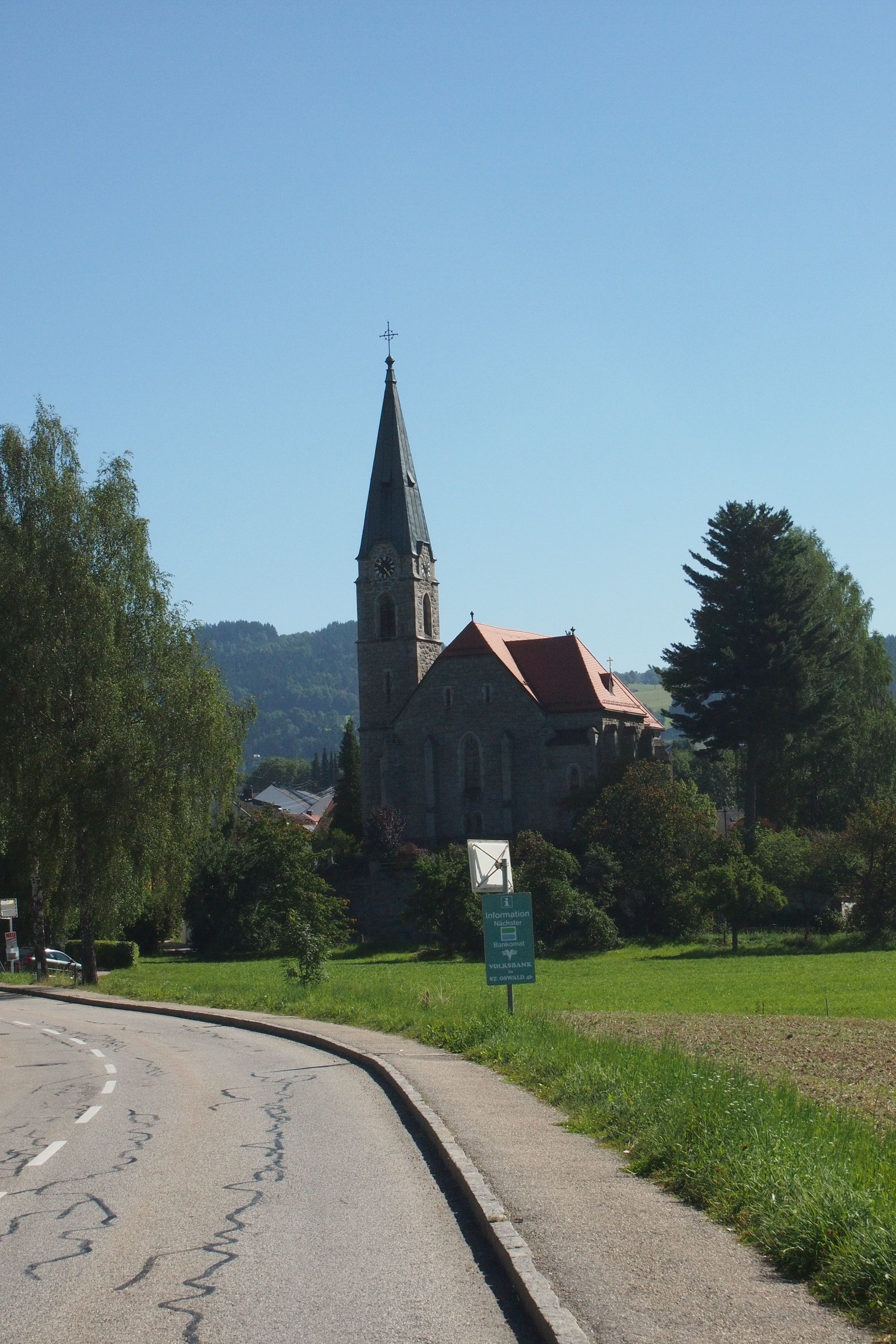 Kath. Pfarrkirche hl. Oswald